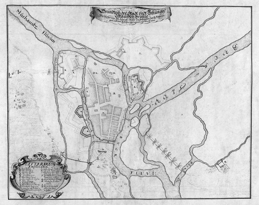 A. Замак B. Рынак C. Езуіцкі касцёл D. Лютэранскі збор E. Грэцкая царква F. Дамініканскі касцёл G. Бернардынскі кляштар H. Габрэйская сінагога I. Пачатак бастыёнаў K. Новыя бастыёны L. Шведскія батарэі. Акопы. M. Крайняя шведская батарэя N. Вугорскія батарэі O. Незавершаныя акопы P. Шведская гарматная батарэя Q. Каралеўскі стан R. Вахта шведскіх рэйтараў S. Рыбны стаў T. Акопы корпуса Якаба Казіміра Дэ ля Гарды